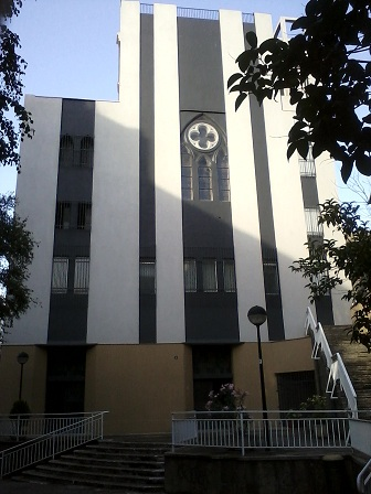 Iglesia de las Carmelitas de Eibar. Situado entre el barrio de Urkizu y el de Azitain, justo debajo del nuevo barrio de Sautsi.